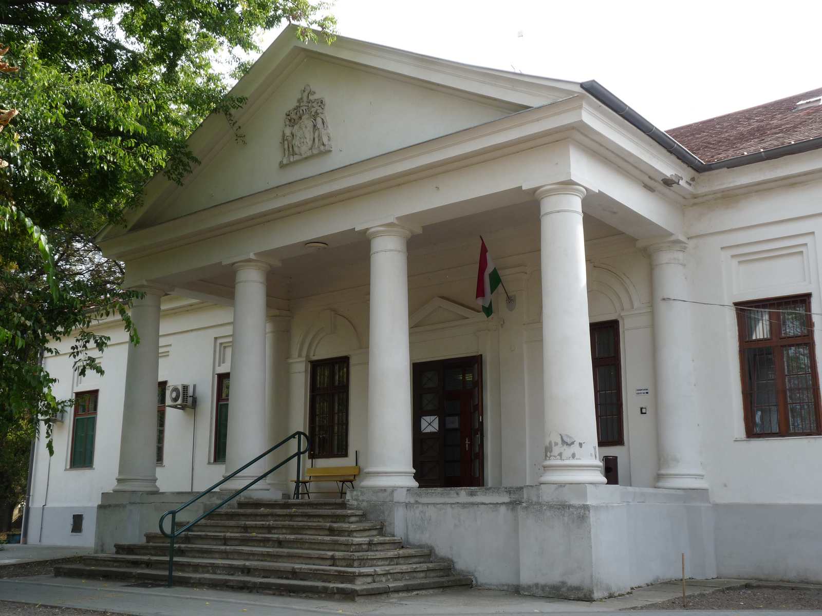 v. Sivó-kúria (Abony, Kálvin János utca 10.)